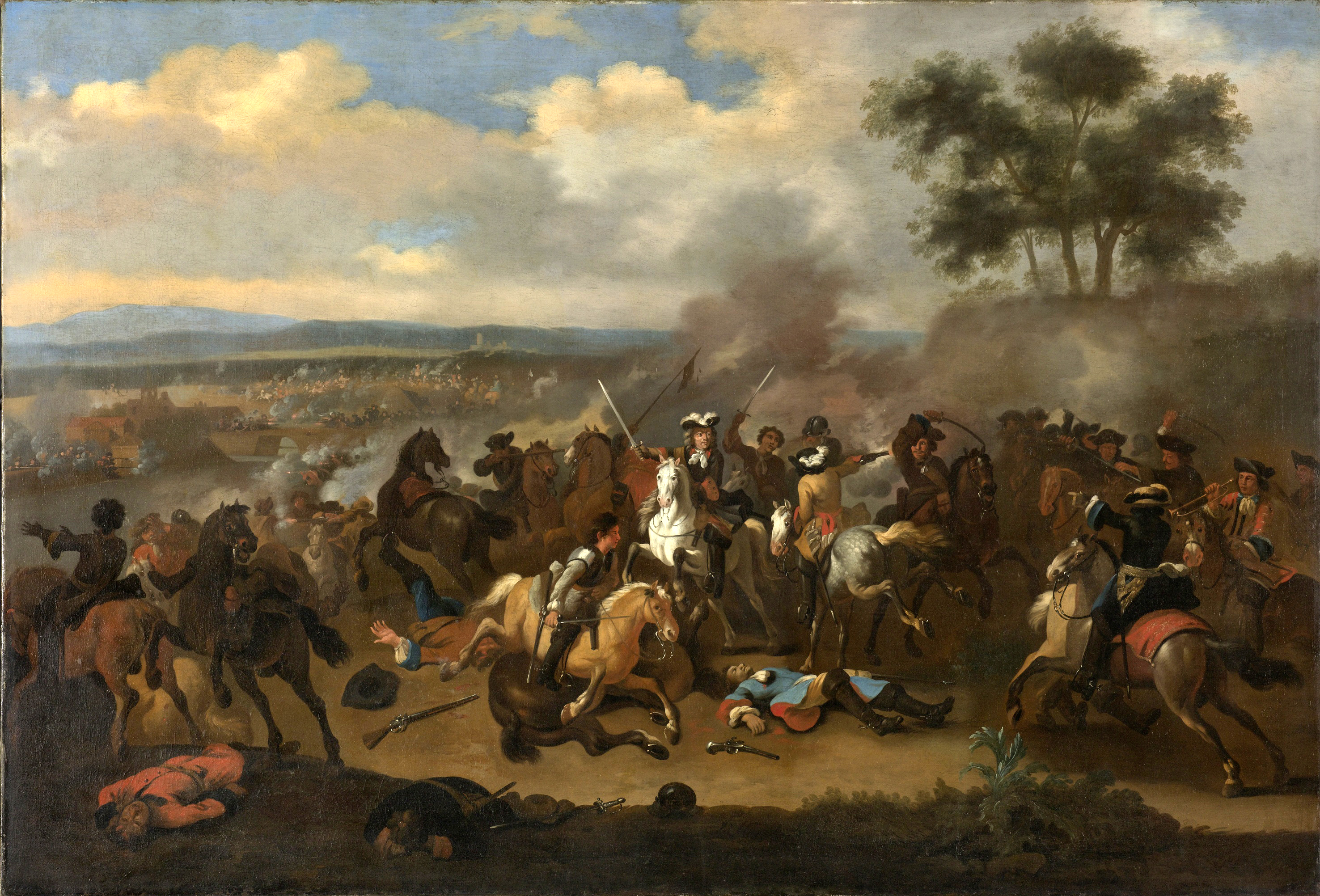 De slag aan de Boyne (Ierland) tussen de legers van Jacobus II en Willem III, 12 juli 1690. In het midden vindt een gevecht tussen ruiters plaats. Op de grond liggen gedode soldaten en paarden.